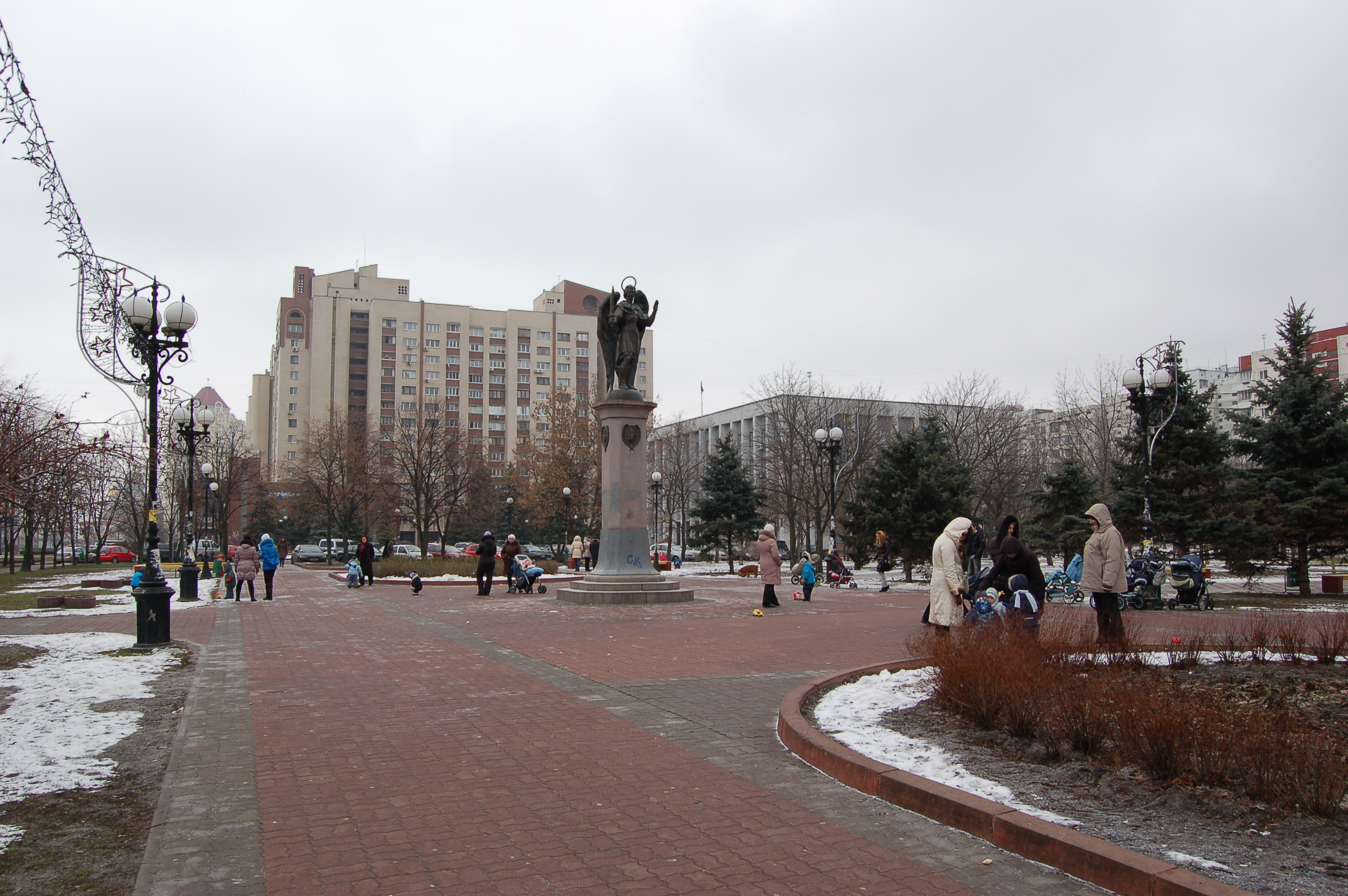 Сквер на Мінській площі у Києві